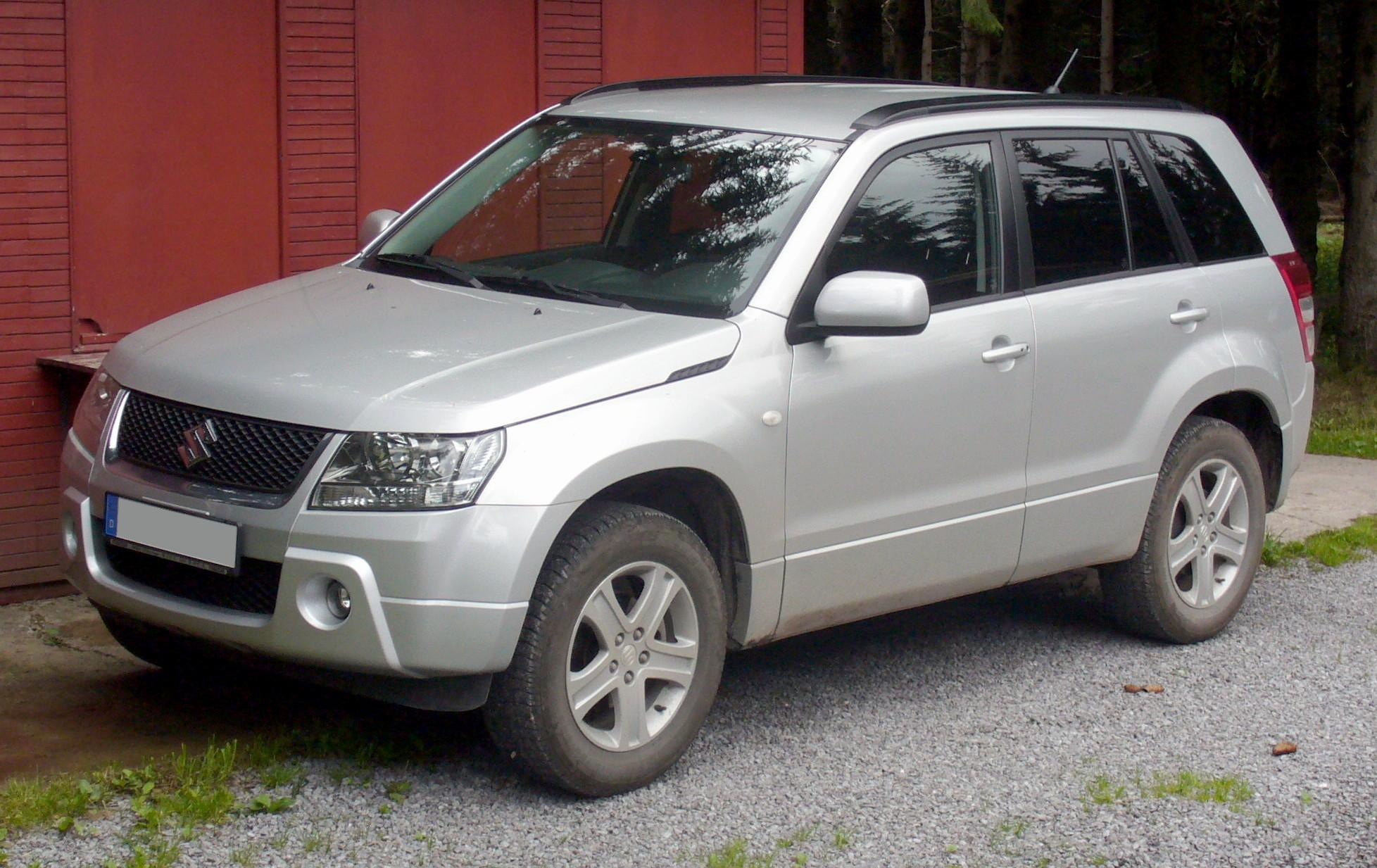 Suzuki Grand Vitara